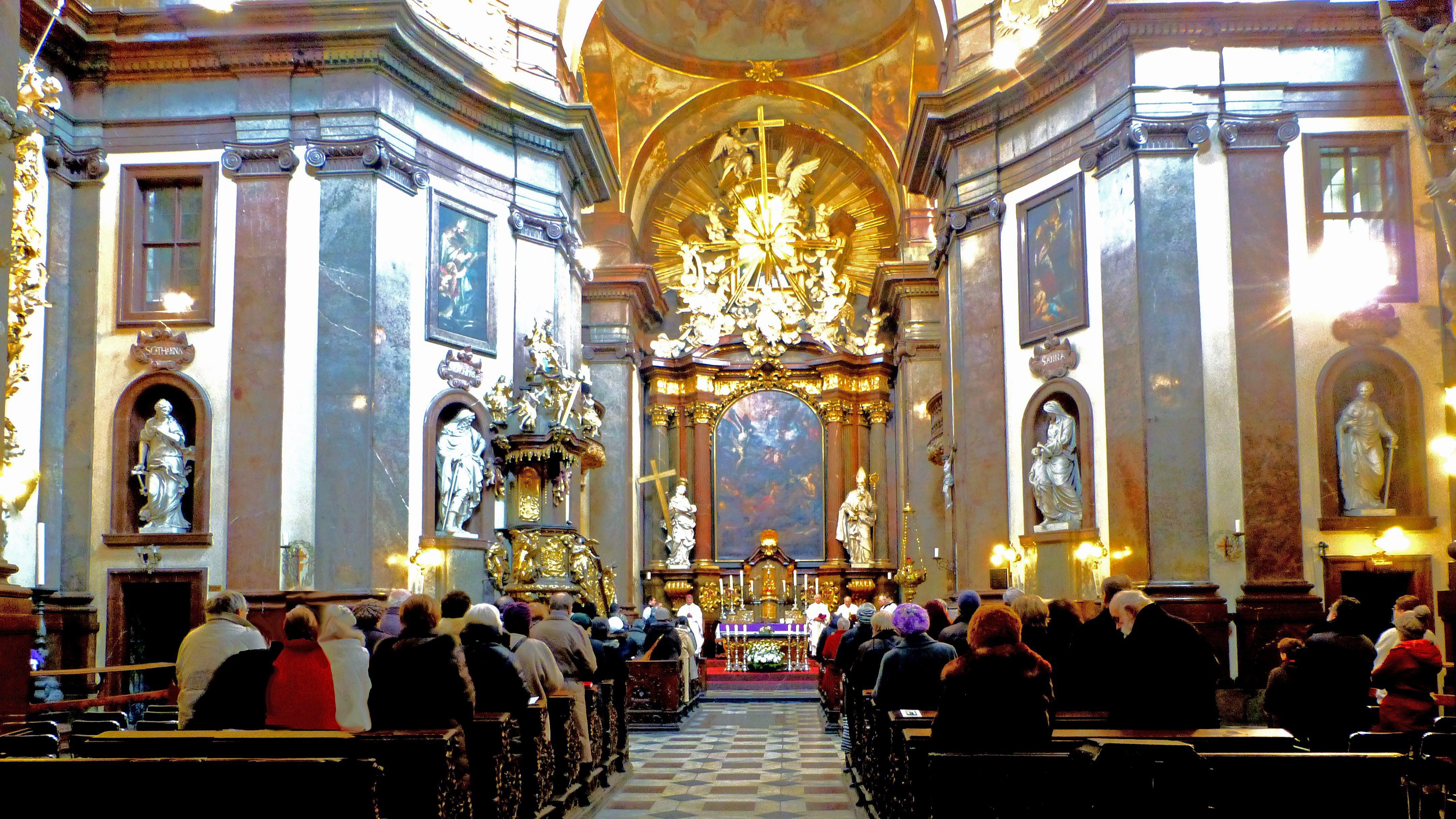 Prag (Altstadt) - Innenaufnahme der Kirche des hl. Franz von Assisi (Kreuzherrenkirche) mit den Skulpturen der hl. Katharina (ganz links) von Conrad Max Süssner und des hl. Joachim (Mitte, links), der hl. Anna mit Jungfrau Maria (Mitte, rechts) und der hl. Barbara (ganz rechts) von Jeremias Süssner (1689/90)